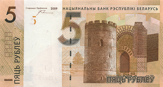 5 белорусских рублей образца 2009 года (лицевая сторона)